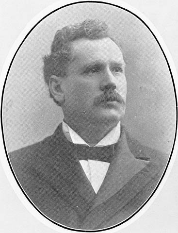 James Cochrane, 26e maire de Montréal